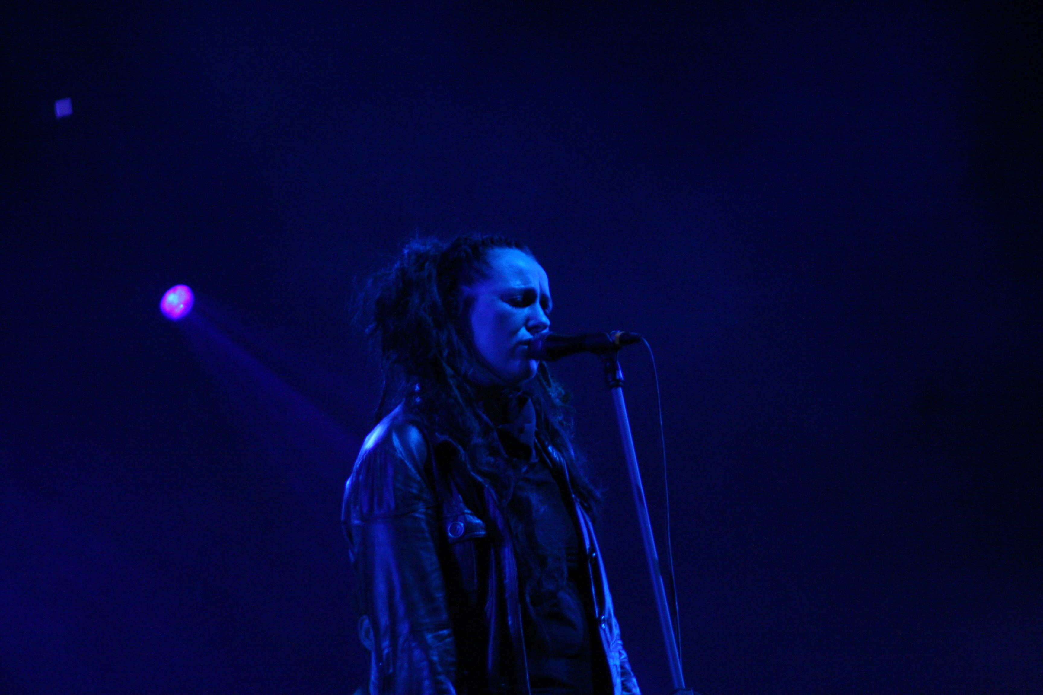 Nosowska, Off Festival, Mysłowice